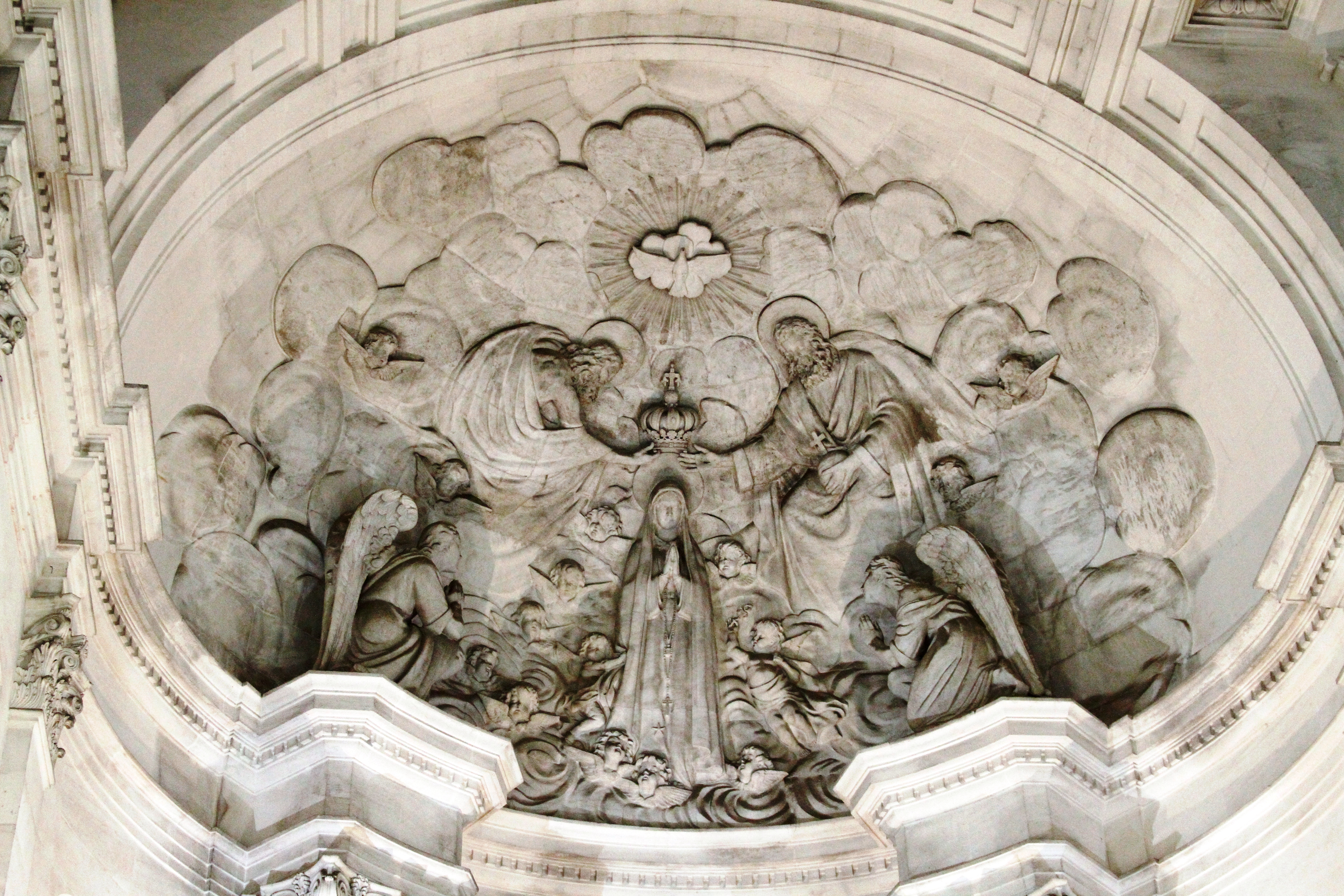 Altar